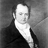 Carl Albert Leopold von Stengel, Regierungspräsident der Pfalz und von Schwaben